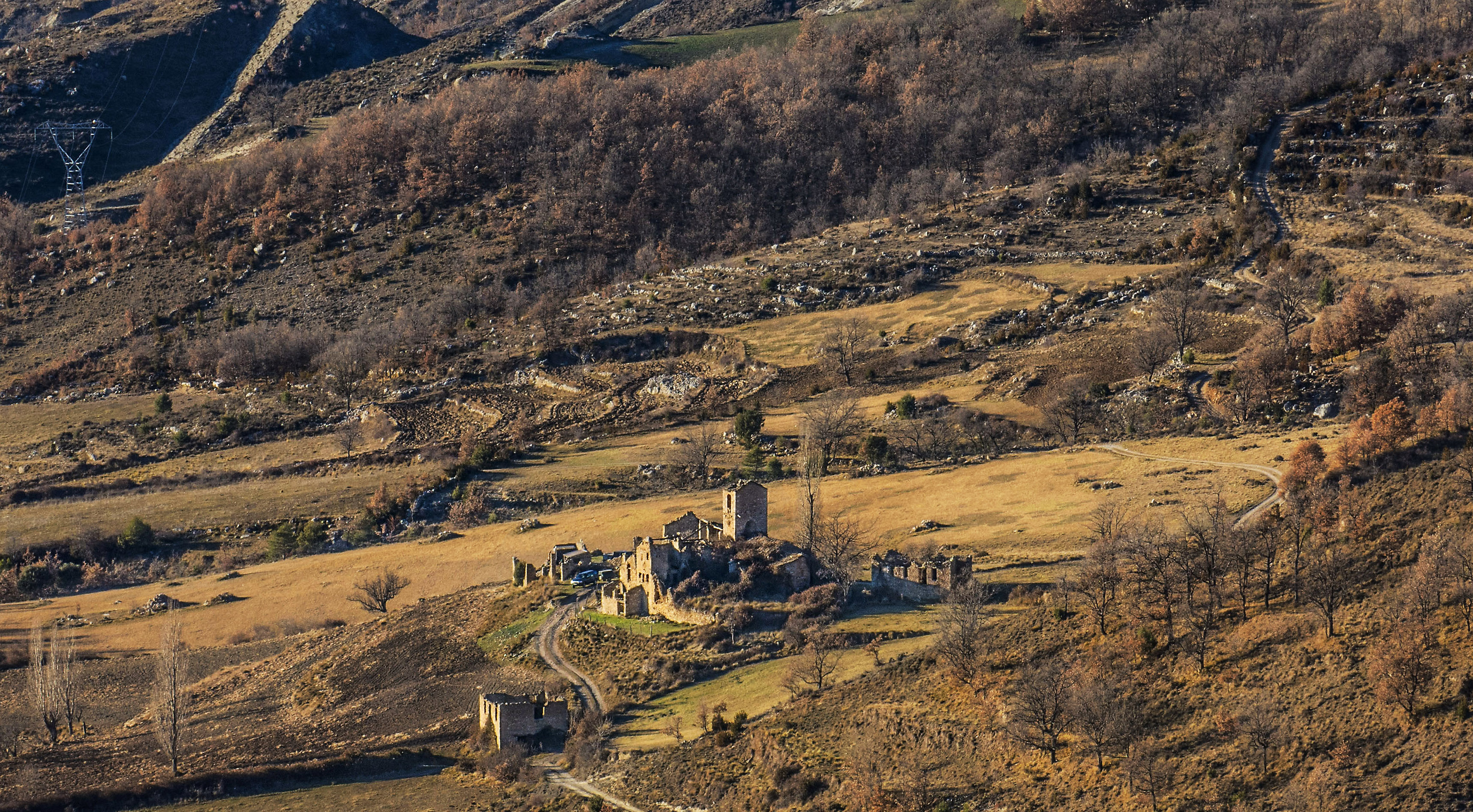 Nocelles és un poble del municipi d'Isàvena, a la Ribagorça aragonesa.